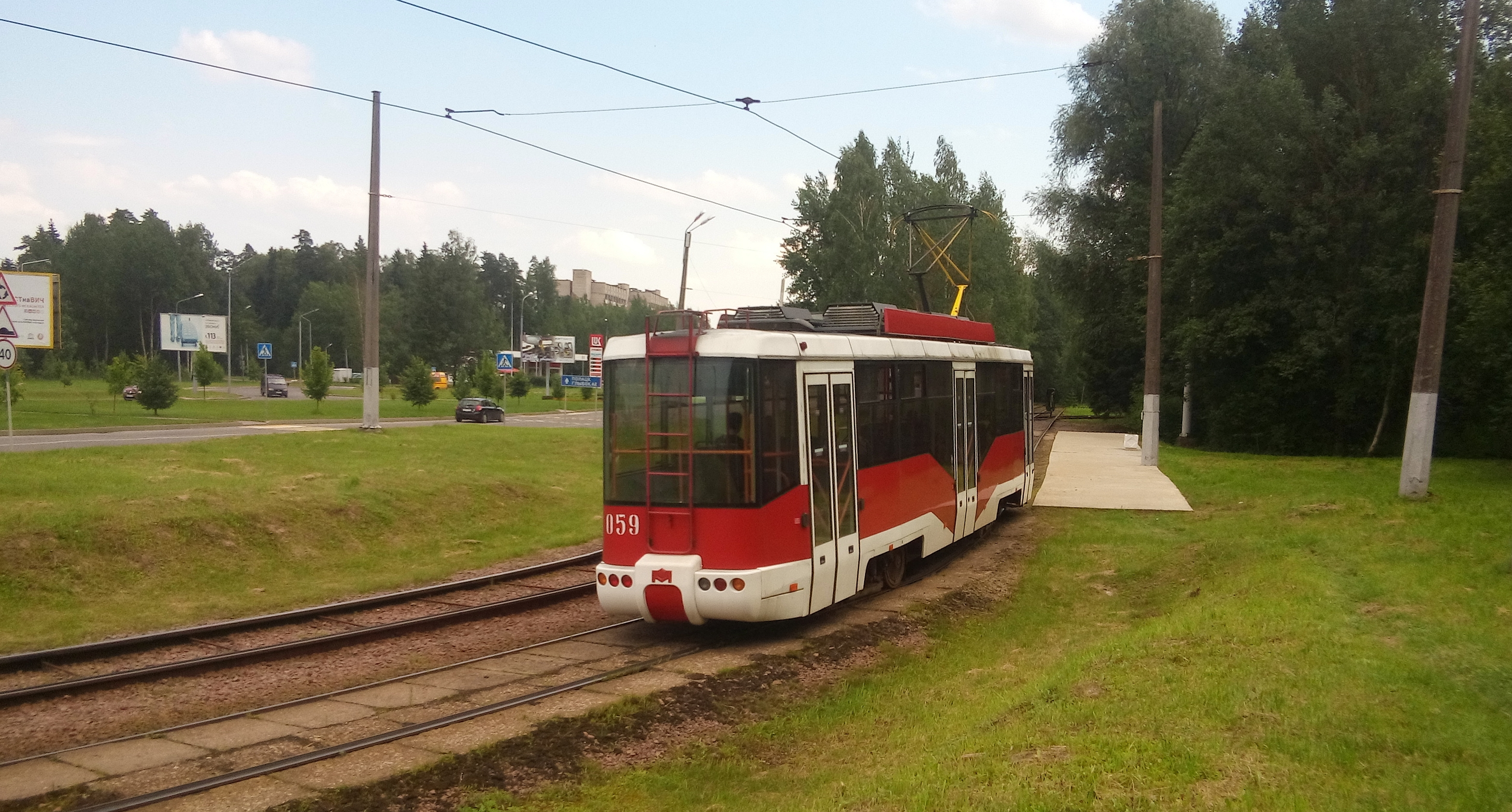 Трамвай Stadler 62103 в Новополоцке